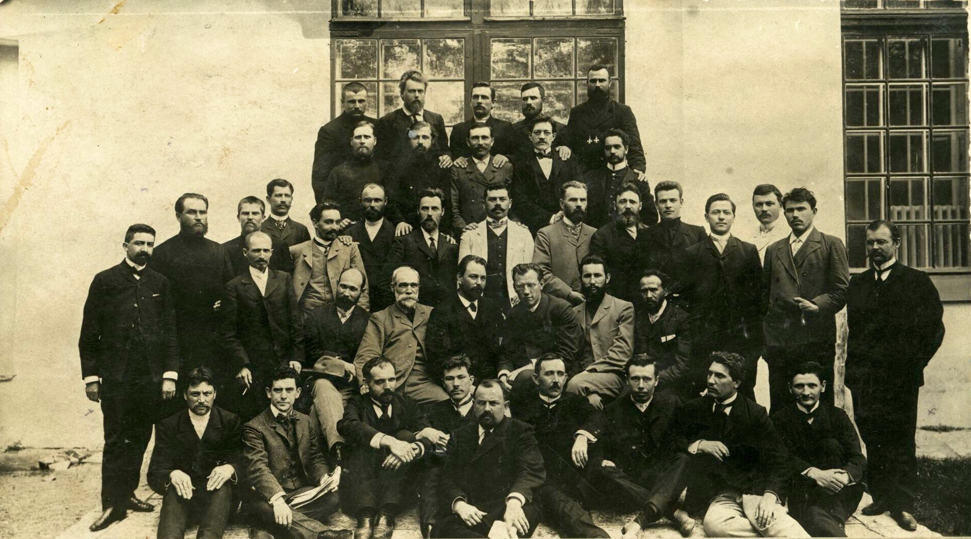 Трудовая группа I Государственной думы. Стоит: Второй слева В. Врагов